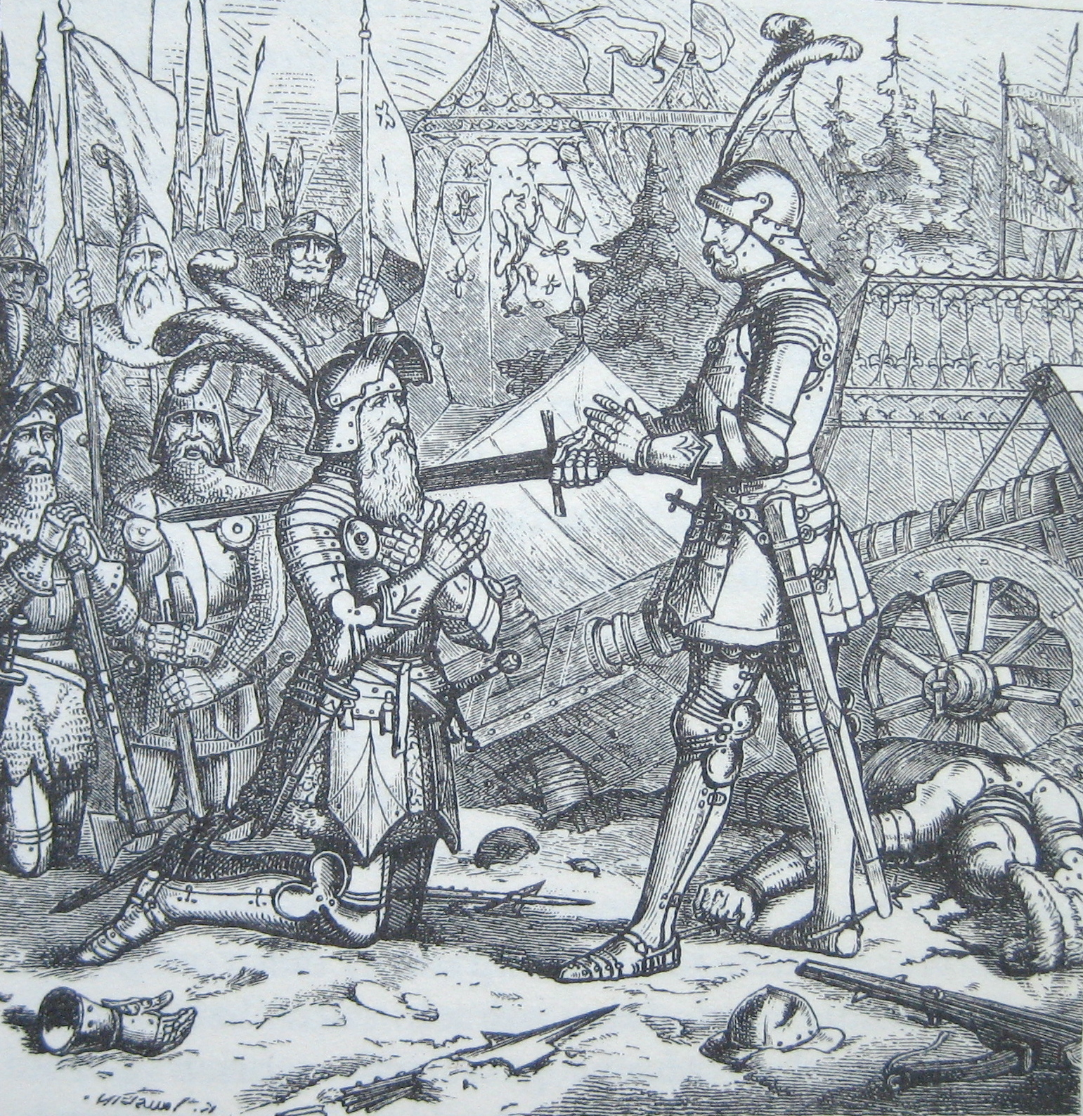 Bürgermeister Hans Waldmann wird vom obersten Hauptmann Wilhelm Herter nach der Schlacht bei Murten zum Ritter geschlagen.